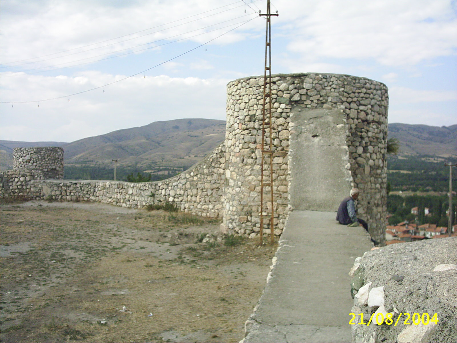 zile kalesi